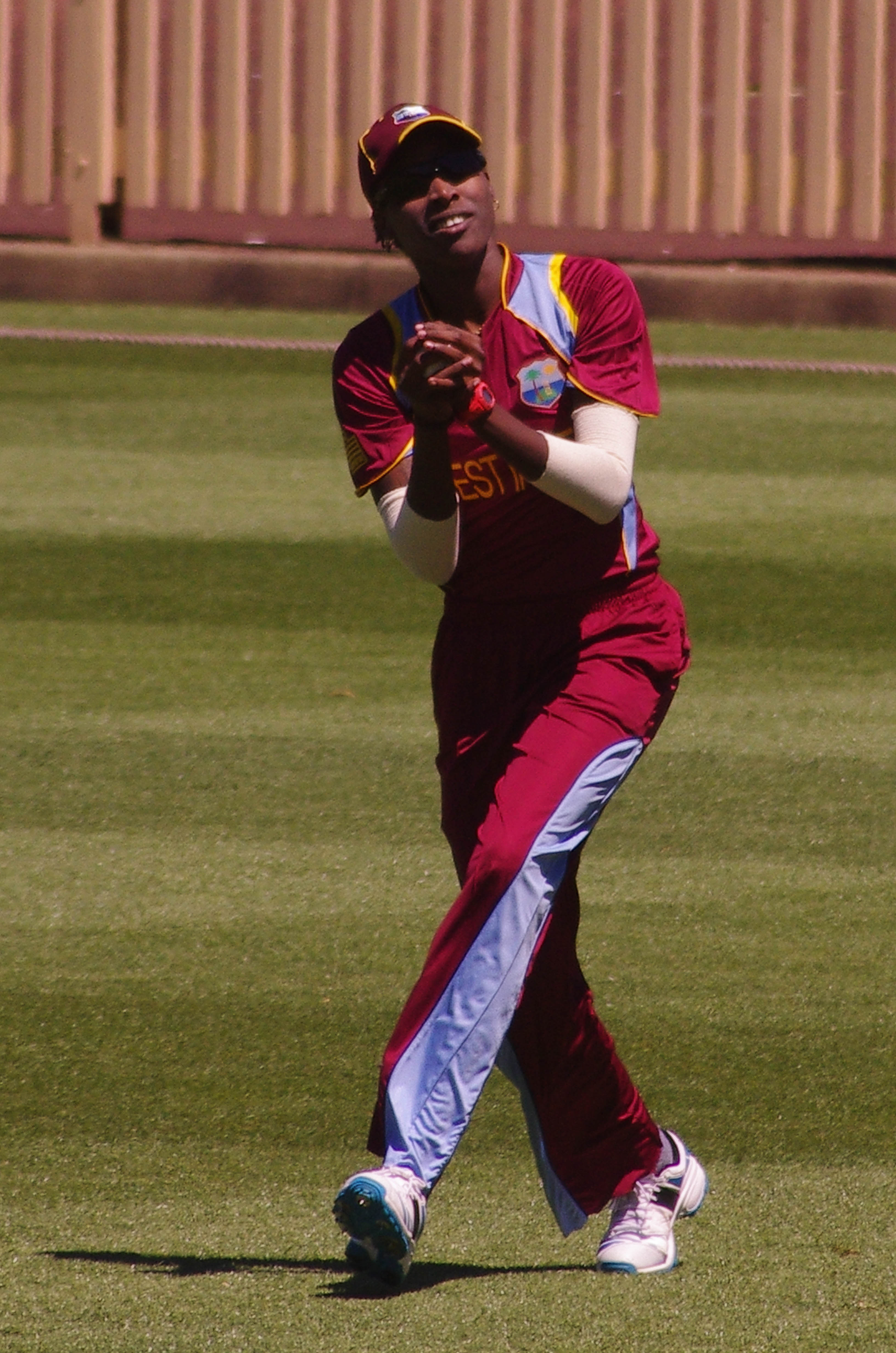 BRITNEY COOPER